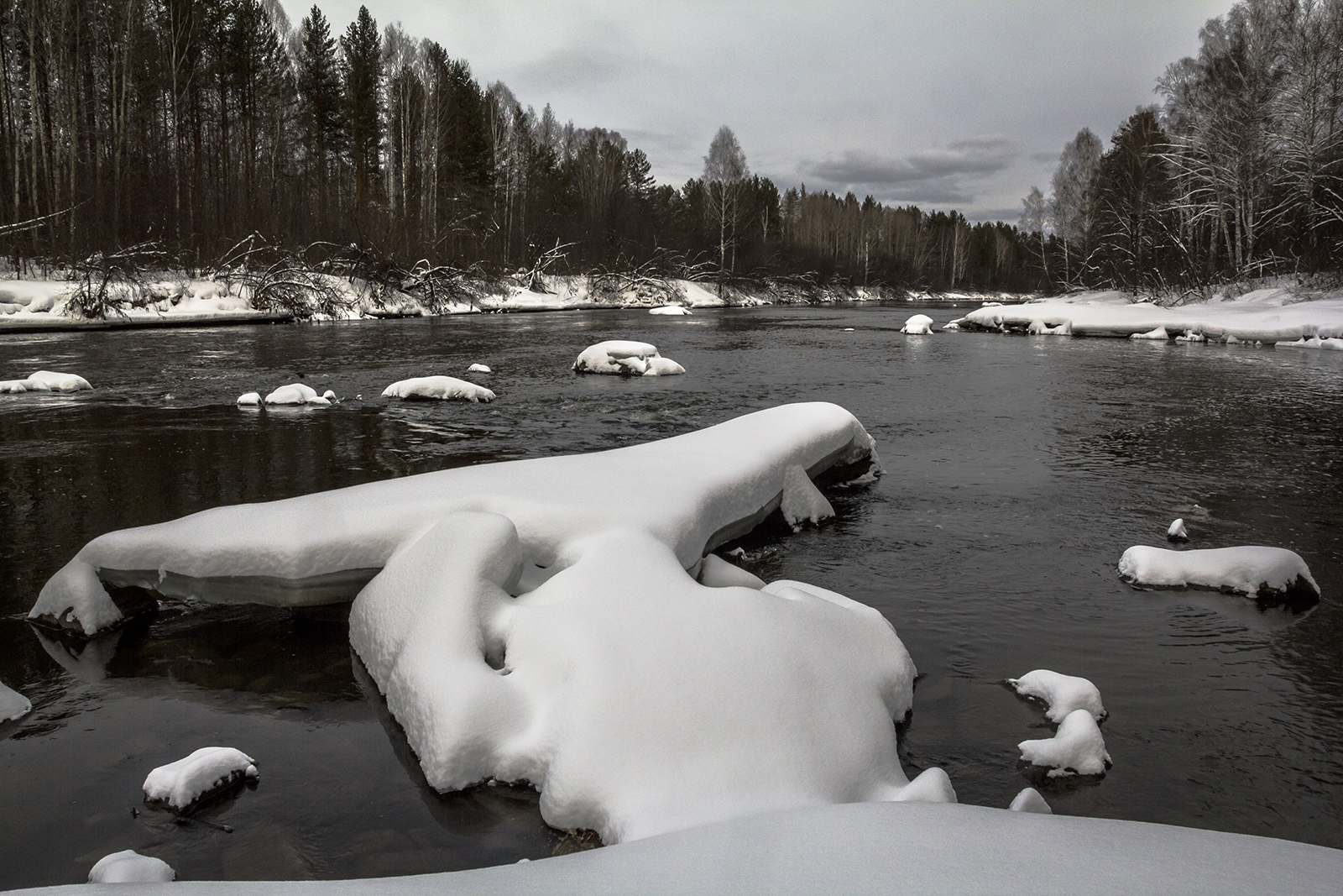 река Тагил